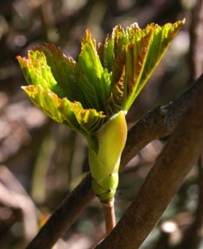 Deilen newydd masarnen